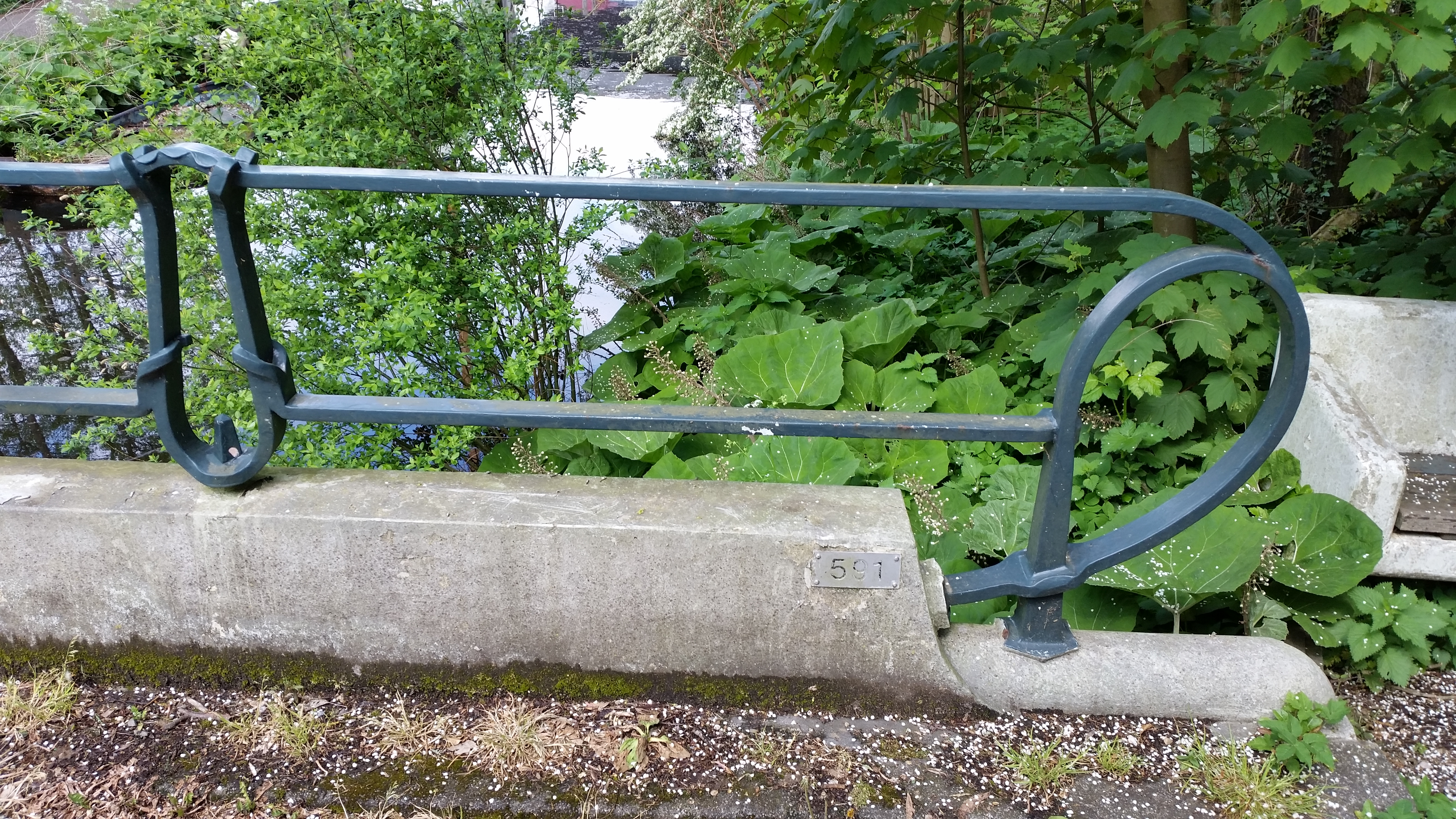 Nummerplaat en afgeronde einden van Brug 591 (in Amsterdam)